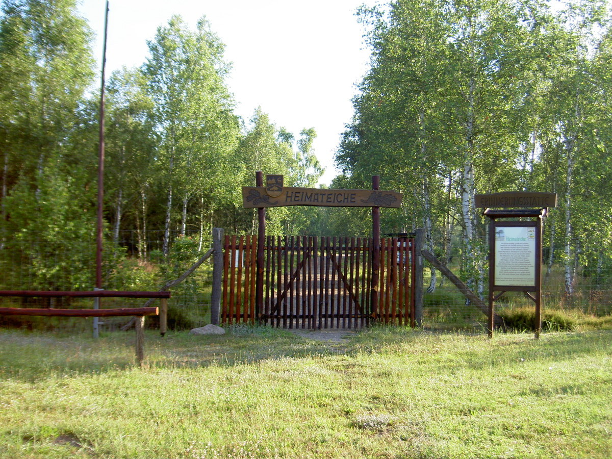 Eingang zur Heimateiche, Glücksburger Heide